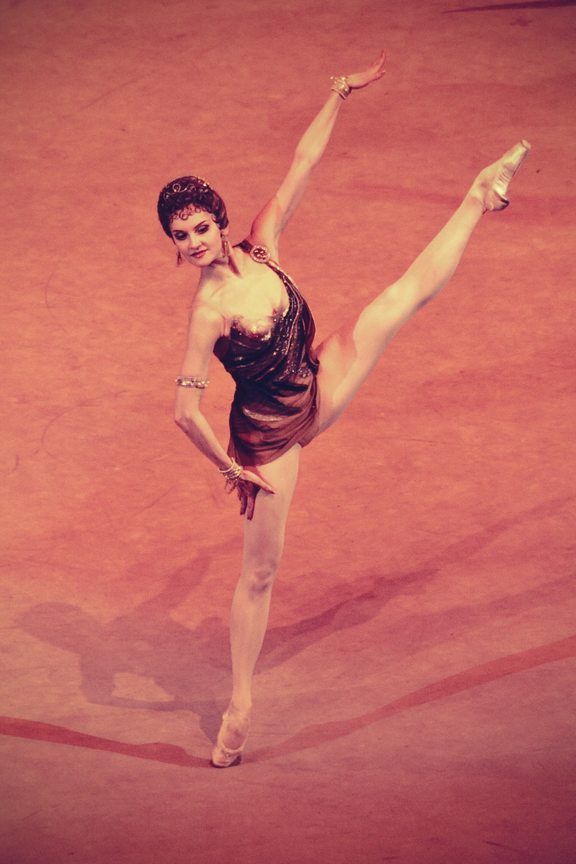 Галина Степаненко в партии Эгины, балет "Спартак", Большой театр, Москва